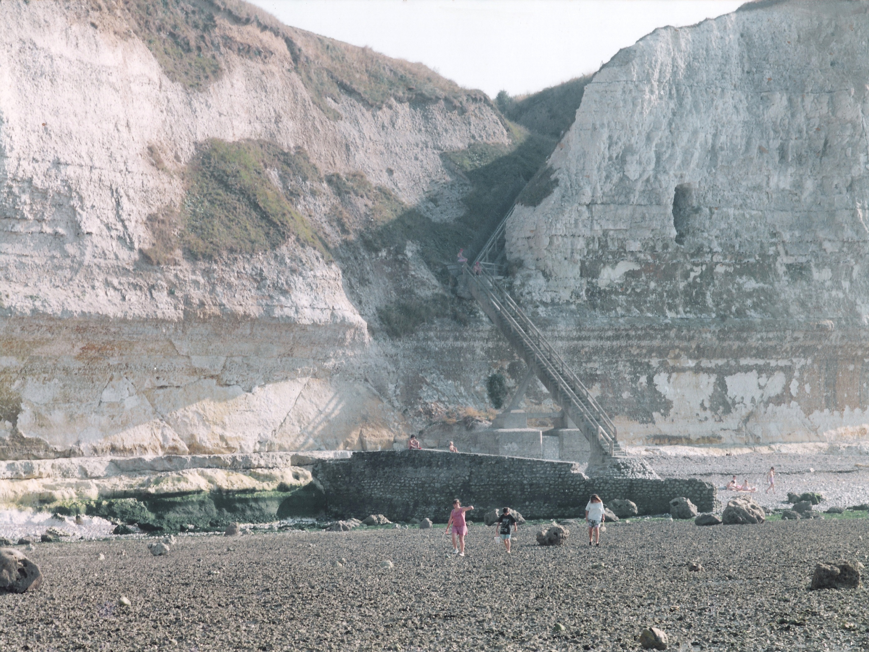 Scan d'une photo de la valleuse d'Életot prise vers 1990.